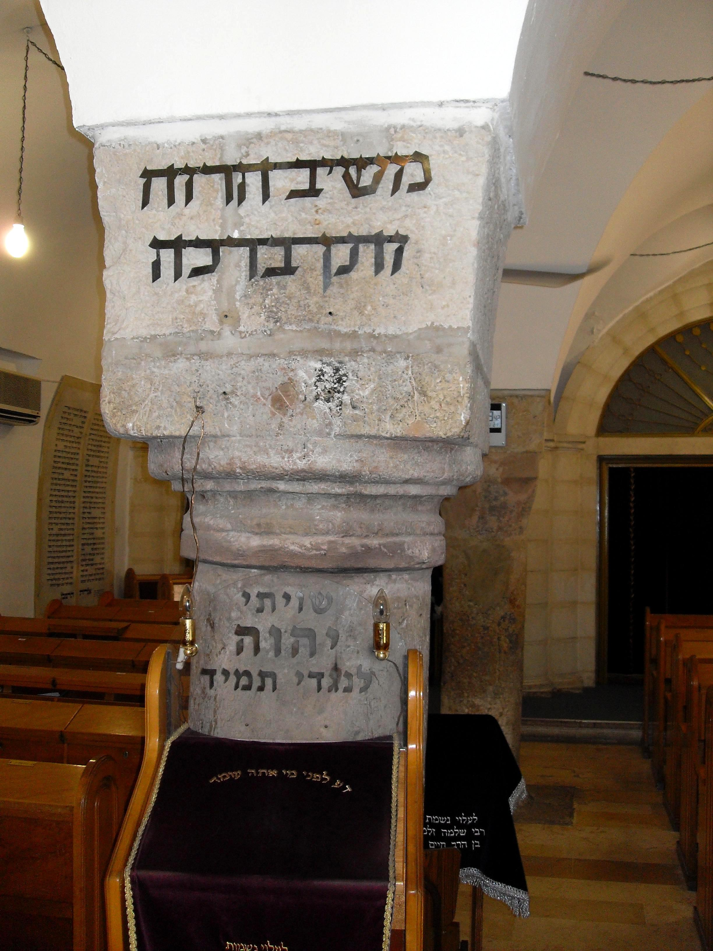 Vieille ville de Jérusalem - Synagogue Ramban - bénédictions de saison Les bénédictions qui figurent sur le pilier permettent de savoir que nous sommes en automne entre Chemini Atseret (8ème jour de Souccot) et le 7 'heshvan (soit en 2010 le 15 octobre), et en effet cette photo a été prise le dimanche 10 octobre 2010 (10/10/10), à 9 heures 24 Dans la deuxième bénédiction de la 'Amida des jours ordinaires : מַשִּׁיב הַרוּחַ וּמוֹרִיד הַגֶּשֶׁם tu fais souffler le vent et tomber la pluie Dans la 9ème bénédiction, la bénédiction des années : וְתֵן בְּרָכָה et donne une bénédiction En hiver, entre le 4 (ou 5) décembre en diaspora ou le 7 'heshvan en Israël (soit en 2010 le 15 octobre), et le premier jour de Pessa'h à la place, on trouvera les bénédictions suivantes : Dans la deuxième bénédiction : מַשִּׁיב הַרוּחַ וּמוֹרִיד הַגֶּשֶׁם tu fais souffler le vent et tomber la pluie Dans la 9ème bénédiction : וְתֵן טַל וּמָטָר לִבְרָכָה et donne une bénédiction de rosée et de pluie En été, entre le premier jour de Pessa'h et Chemini Atseret, on trouvera les bénédictions suivantes : מוֹרִיד הַטַל tu fais descendre la rosée וְתֵן בְּרָכָה et donne une bénédiction Plus bas figure le verset biblique Psaumes 16,8 : שִׁוִּיתִי יהוה לְנֶגְדִּי תָמִיד Le nom de D.ieu est toujours devant moi et la phrase brodée sur la nappe : דַּע לִפְנֵי מִי אַתָּה עוֹמֵד Know before whom you stand! Sache devant qui tu te trouves! (Berachot 28b).